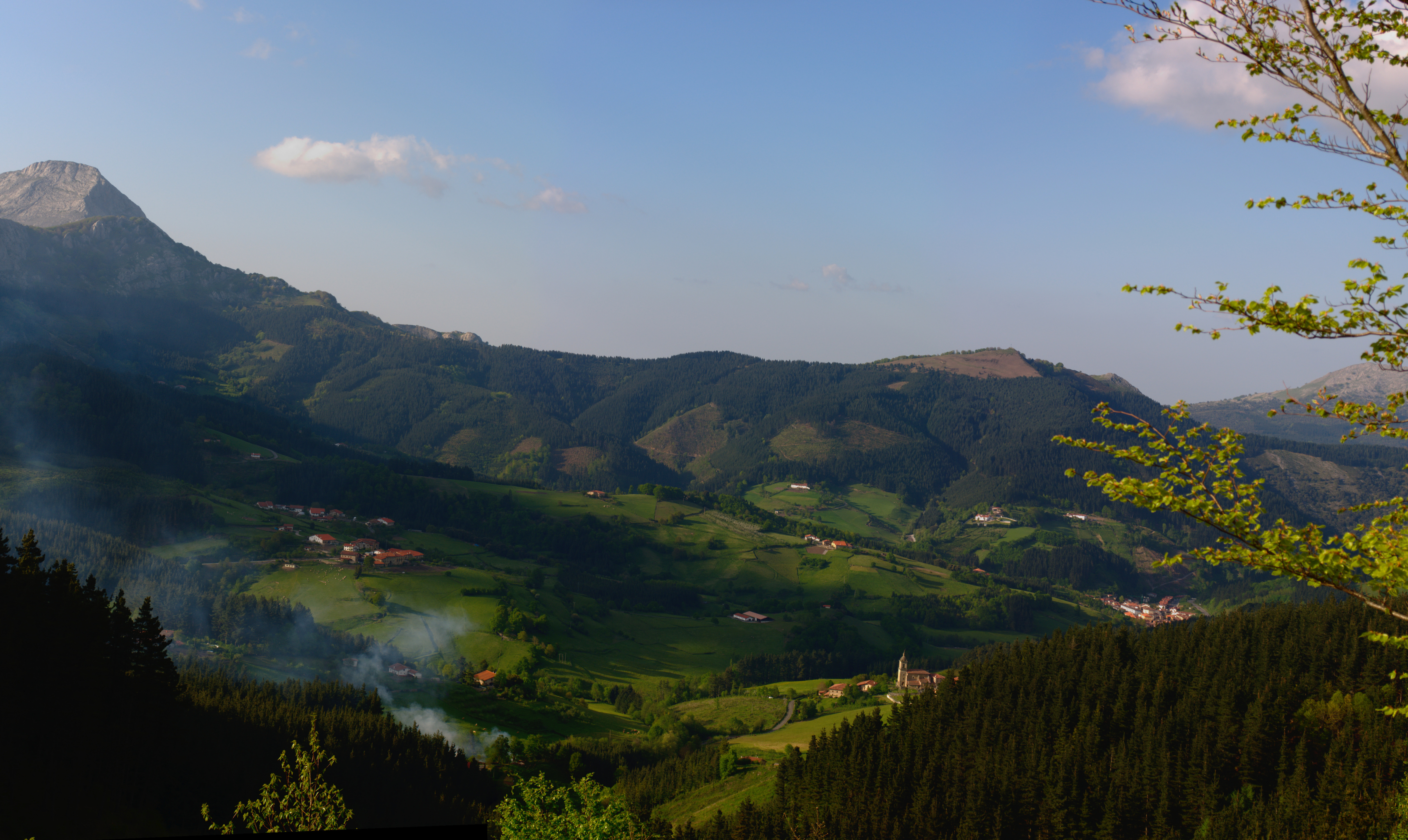 Aramaio ibarraren ikuspegi orokorra